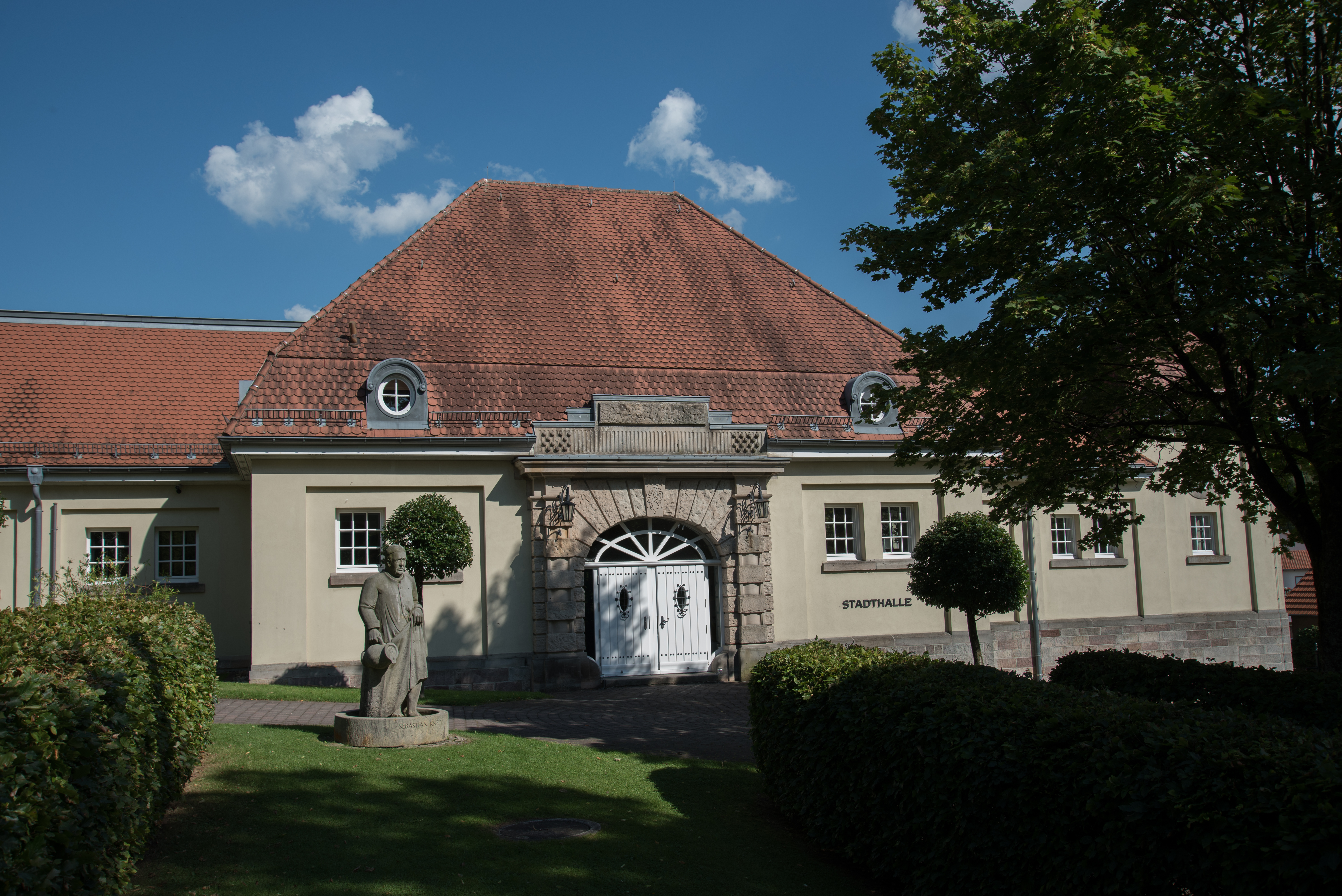 Gersfeld, Schloßlatz 9